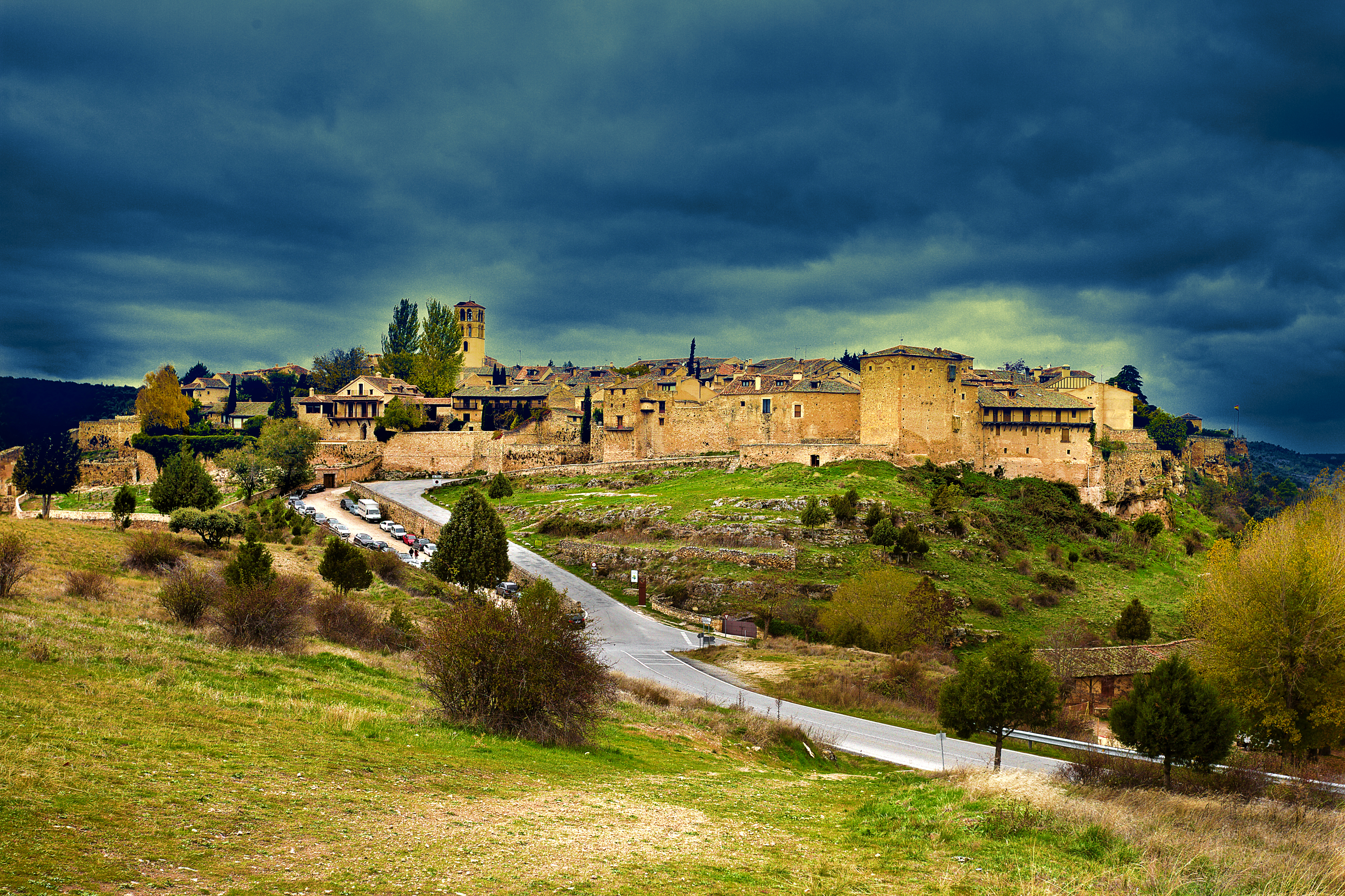 Pedraza (Segovia) desde la carretera de acceso